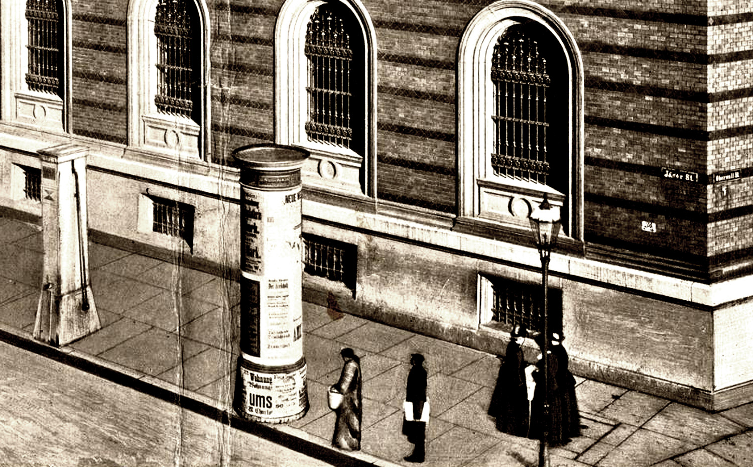 Auf dem Lichtdruck (Heliogravüre, s/w) ist das Gebäude der Reichsbank Berlin entlang der Südseite der Jägerstraße (N°34-N°38) zwischen Oberwall- und Kurstraße abgebildet. Der Ausschnitt des Bildes zeigt die SO-Ecke an der Oberwallstraße, an der vor dem Gebäude ein typikscher Kastenbrunnen (öffentliche Zapfstelle über einem Kesselbrunnen, wie sie in Berlin zwischen 1750 und 1870 aufgerichtet wurden) als Ausschnitt des Gesamtbildes erfasst wurde.